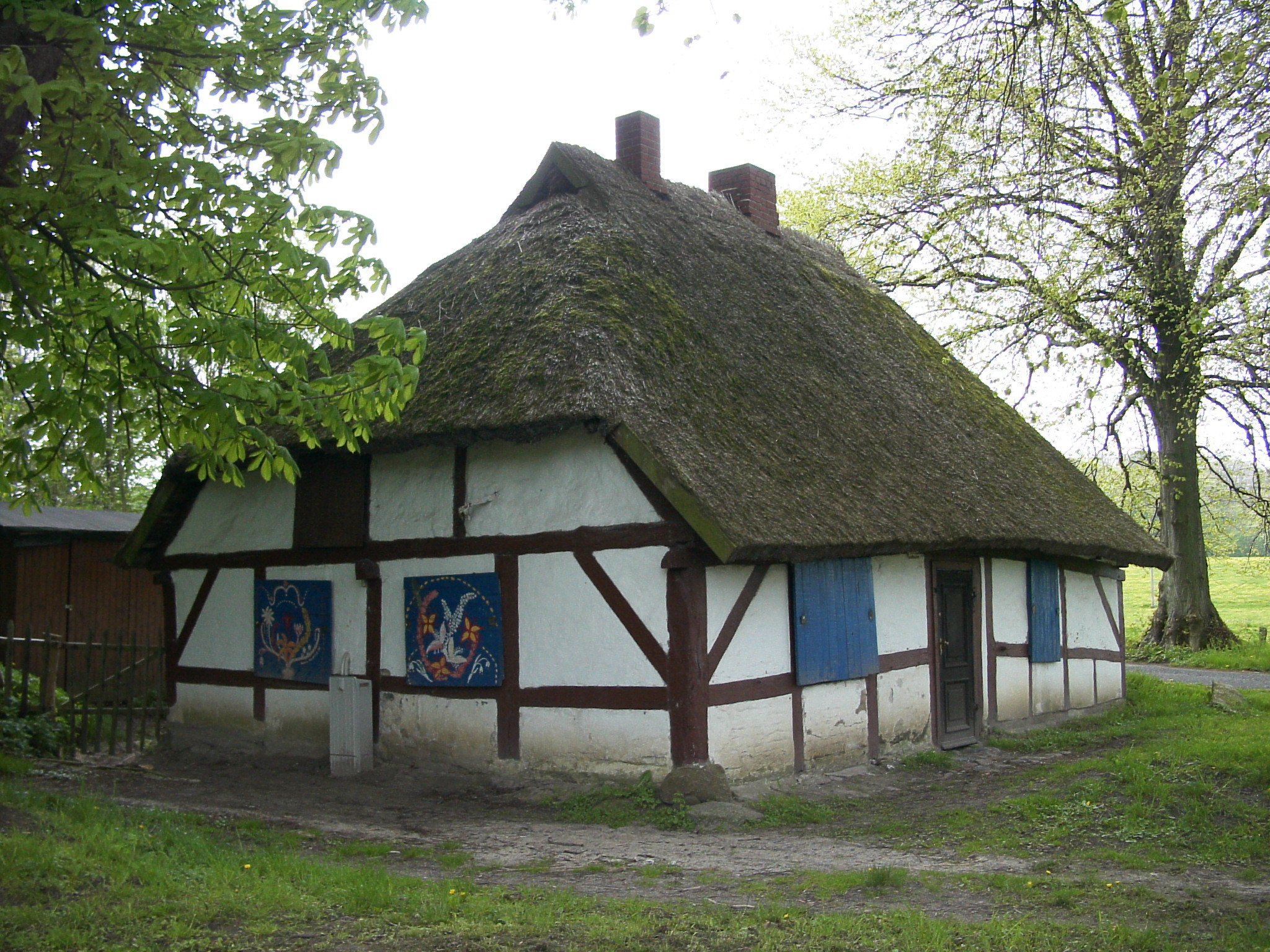 Alte Bauernkate in Ralswiek, im Jahr 2007 abgebrannt